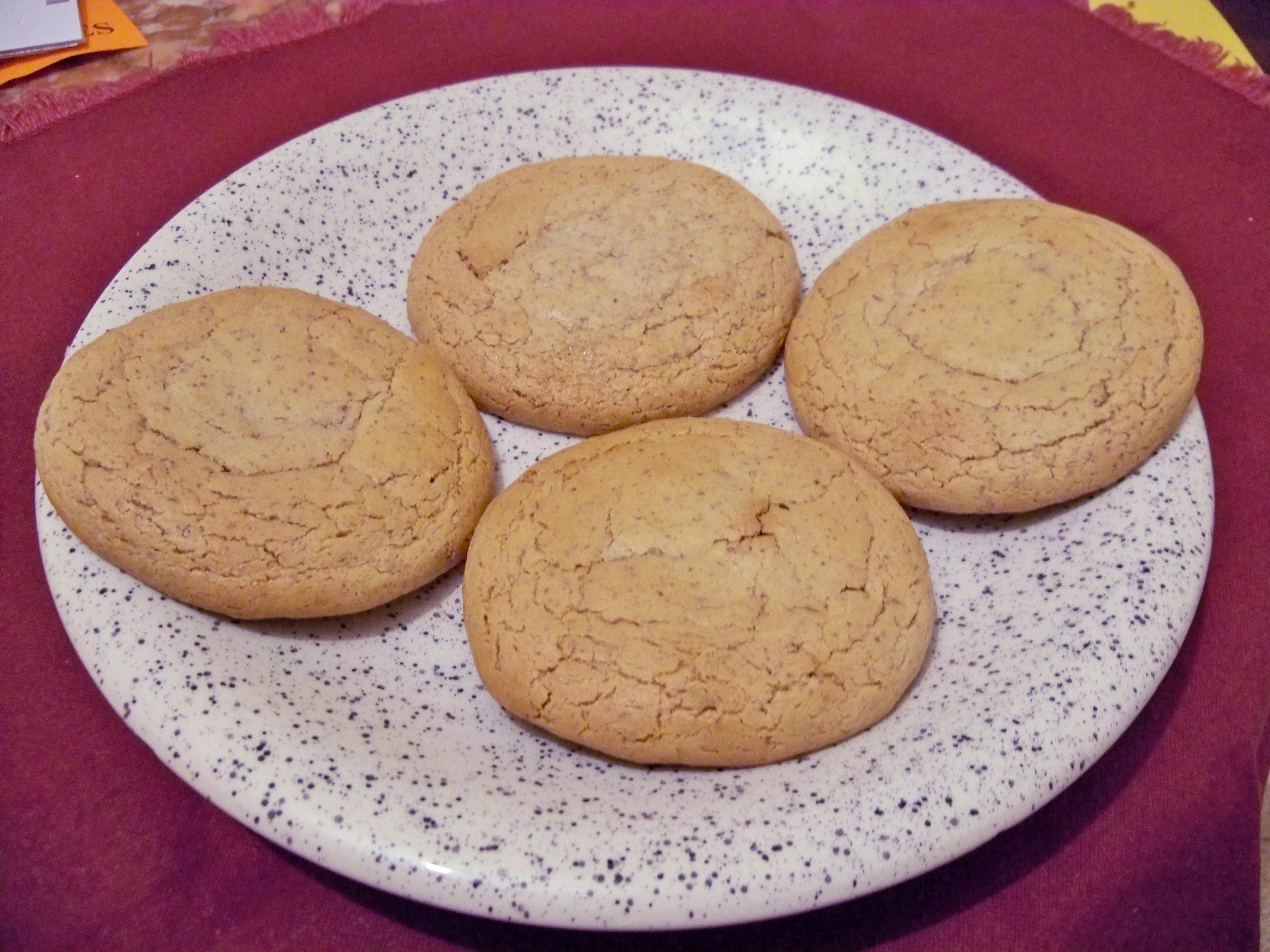 macaron de chez Boyer à Sault (Vaucluse, France)